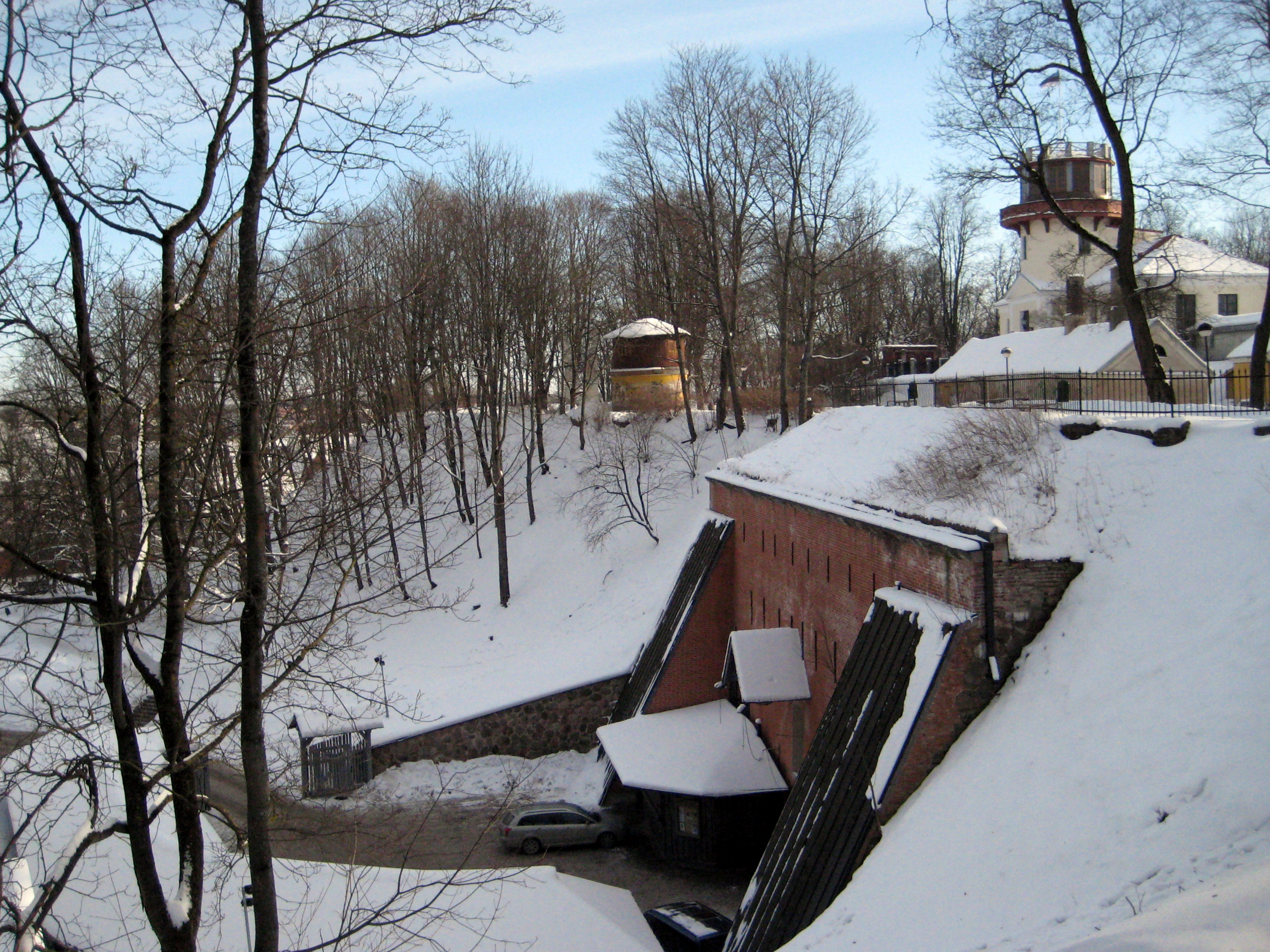 Püssirohukelder ja tähetorn